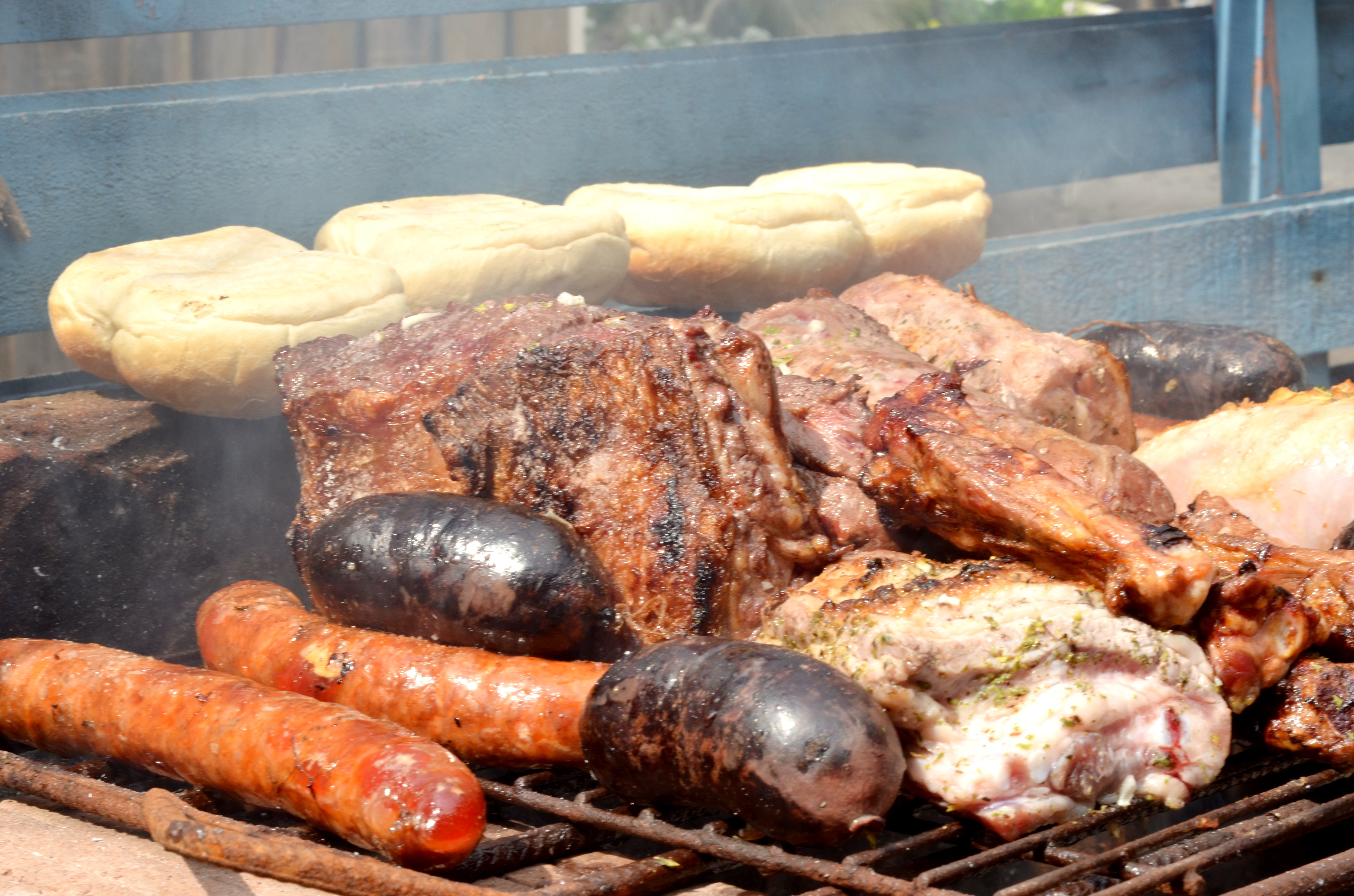 Asado chileno